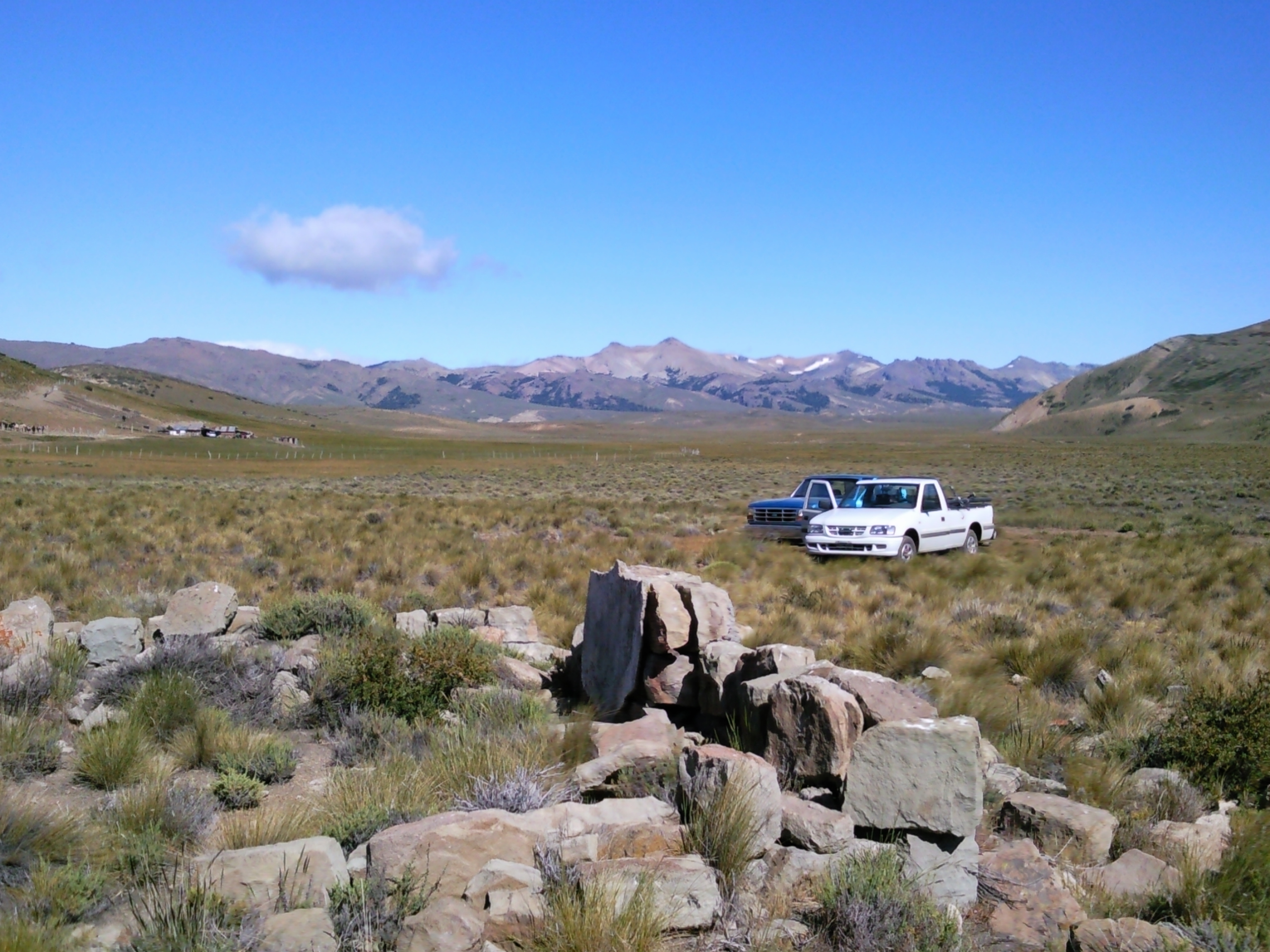 Arroyo Chenqueniyén